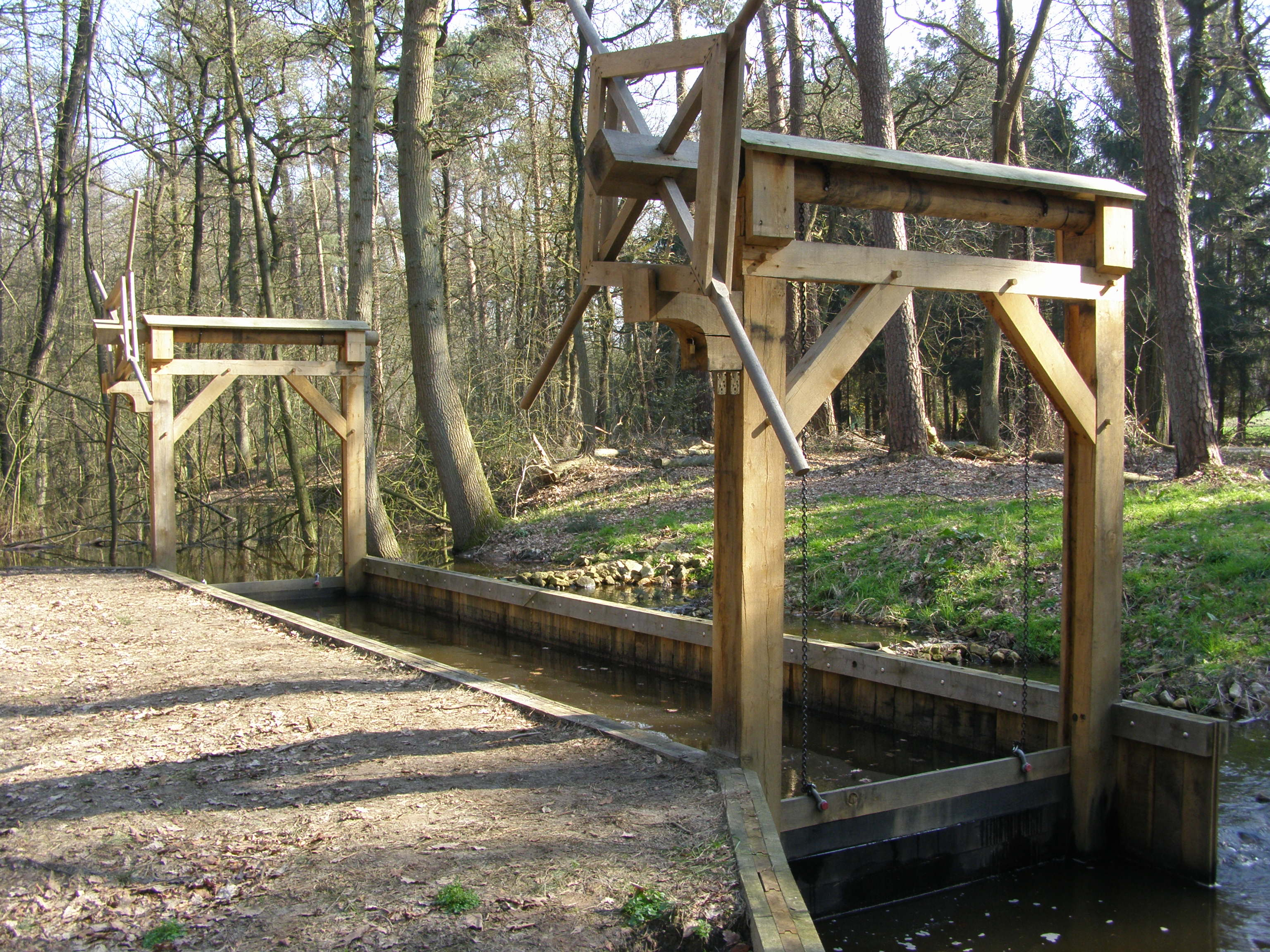 Eigen werk.